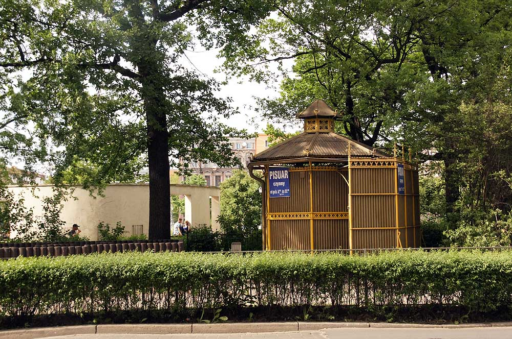 Rejon placu św. Macieja (d. pl. Engelsa) ograniczony ul. Rydygiera, Drobnera, Jedności Narodowej, Ołbińską, pl. Powstańców Wielkopolskich i pl. Staszica. pl. św. Macieja, Miasto Wrocław - Śródmieście